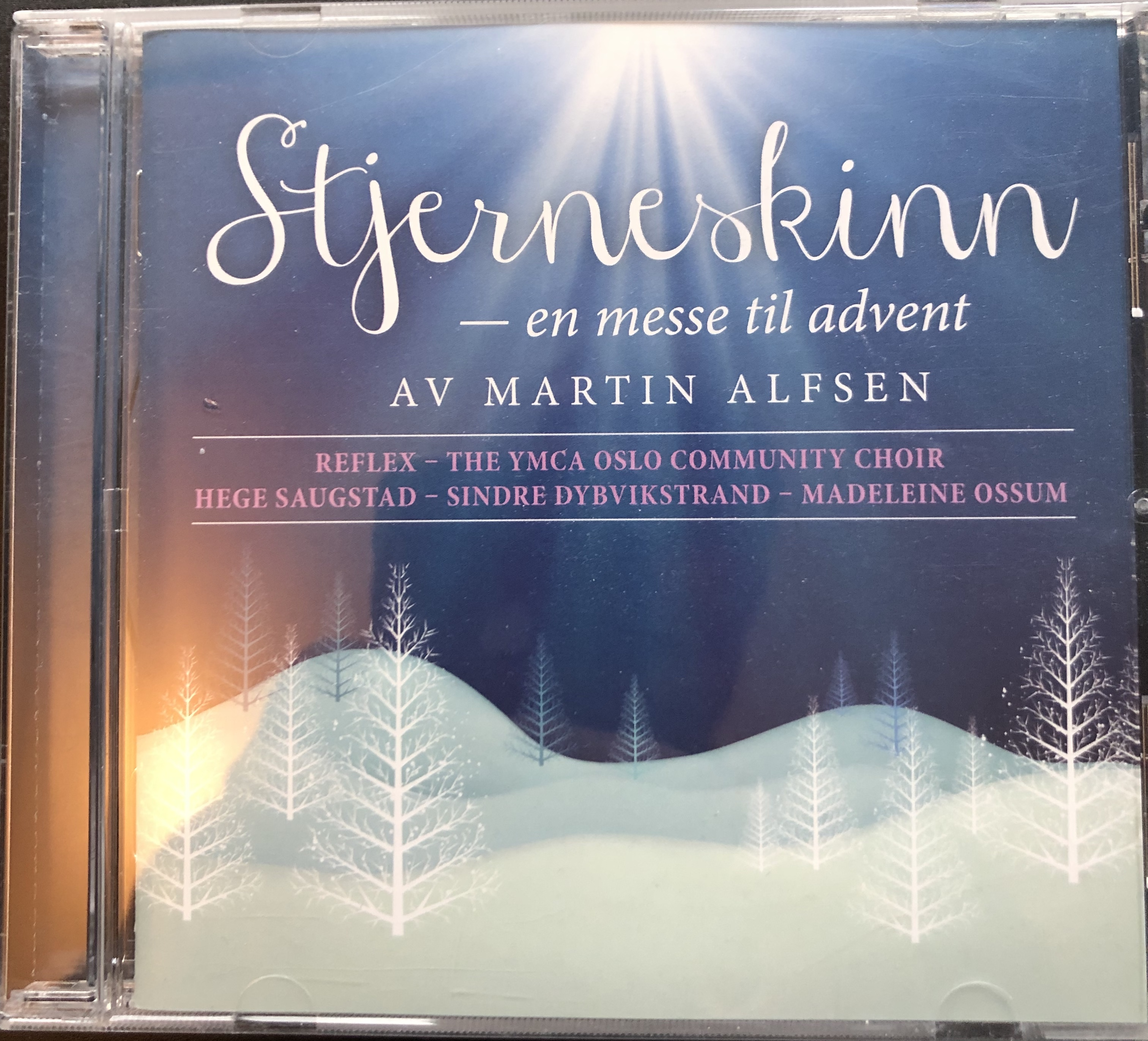 Coverfoto til Stjerneskinn